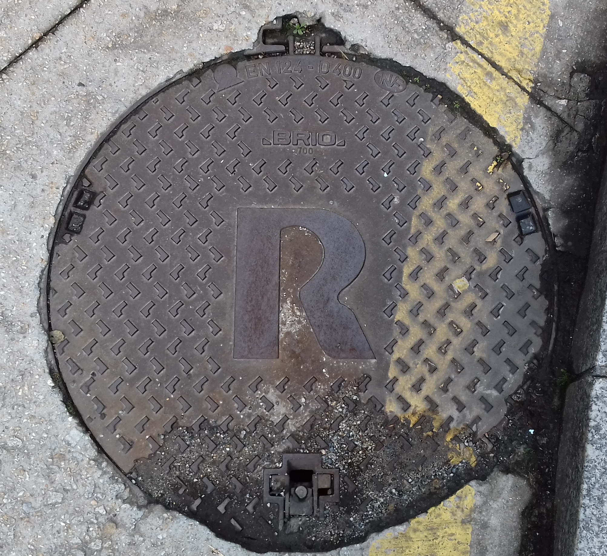 Tapa de rexistro da empresa R en Santiago de Compostela